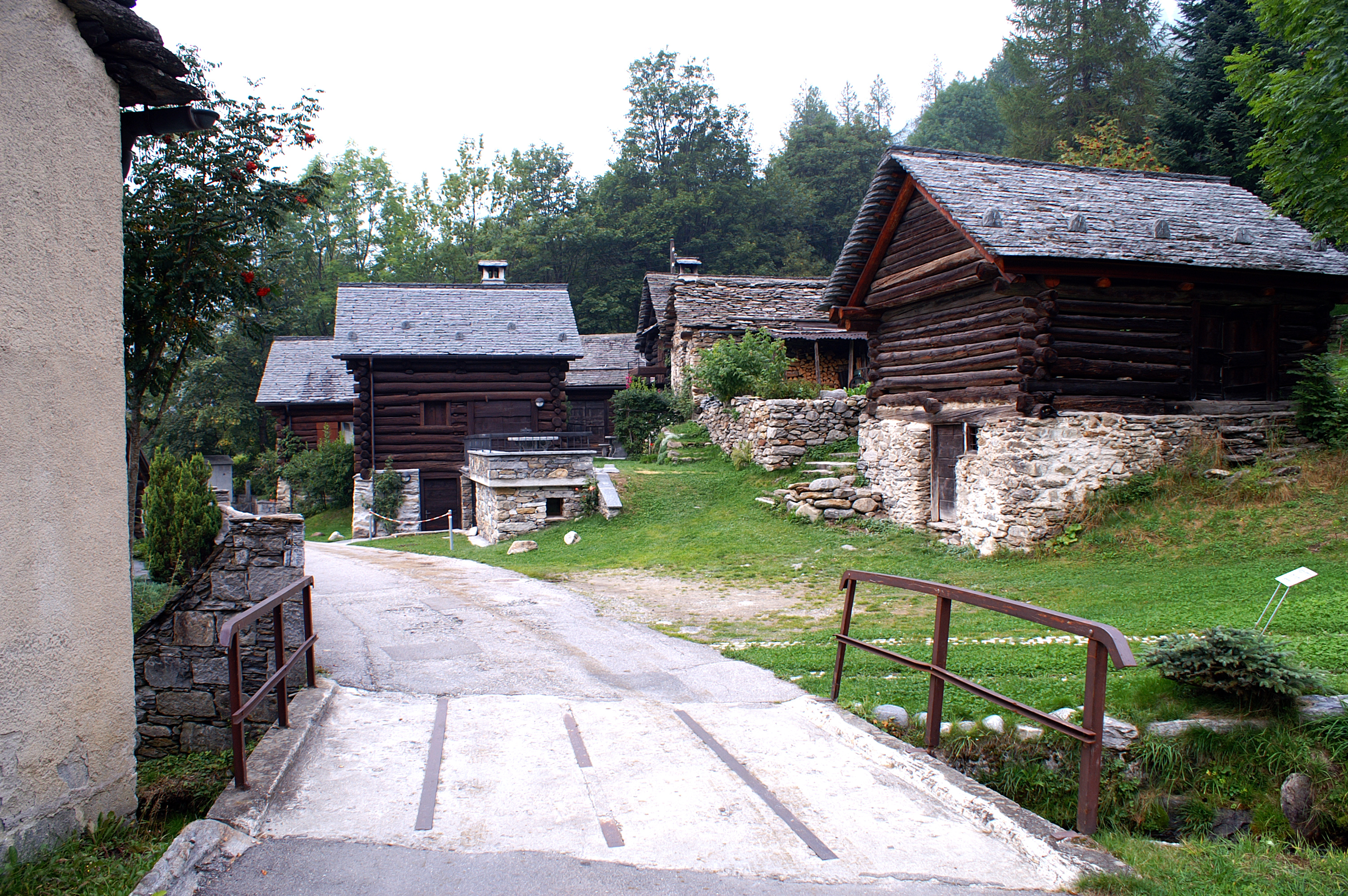 Ortsansicht von Mogno im Vallemaggia im Tessin, Schweiz